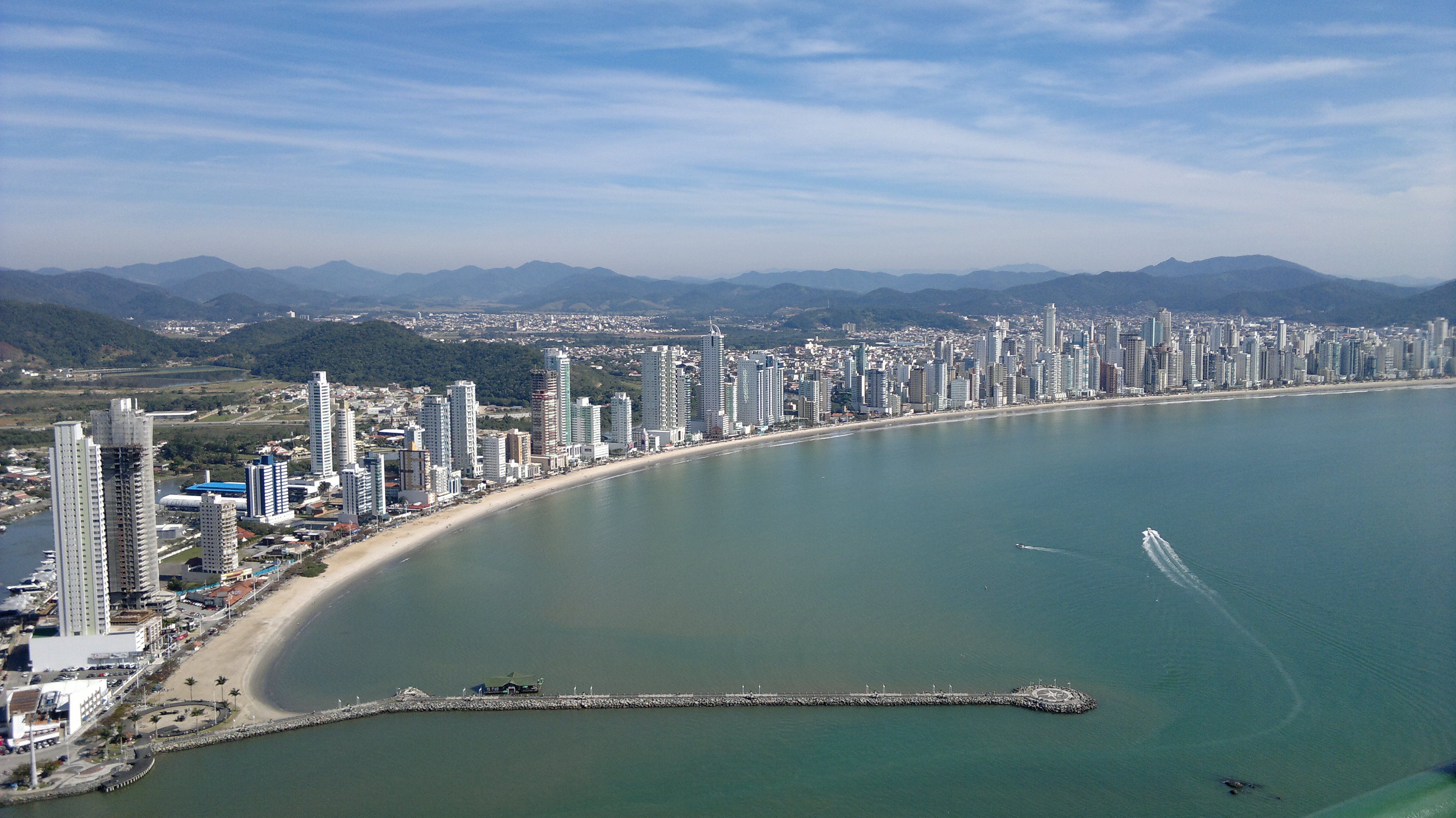 Balneário Camboriú - SC - Brasil